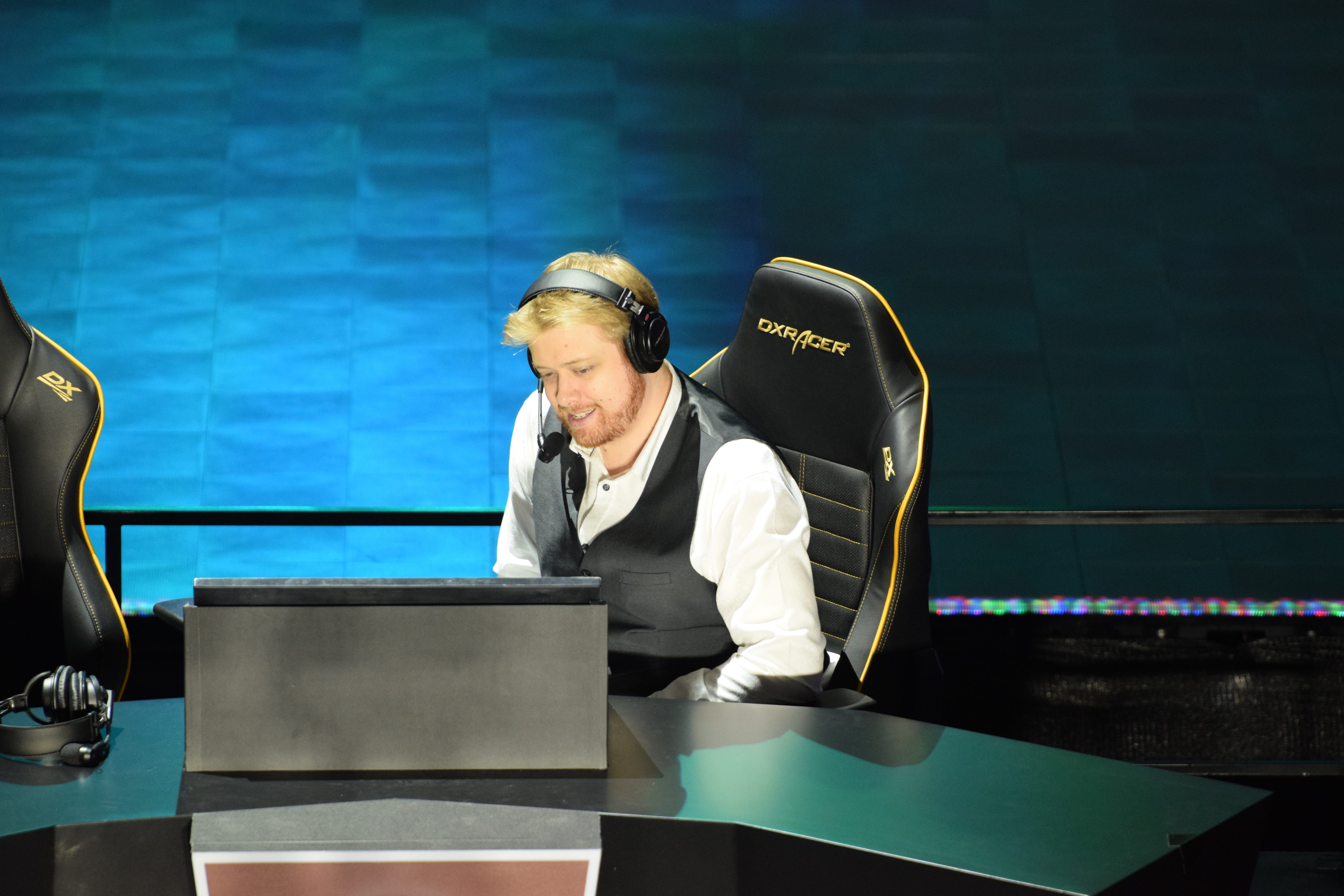 TobiWan